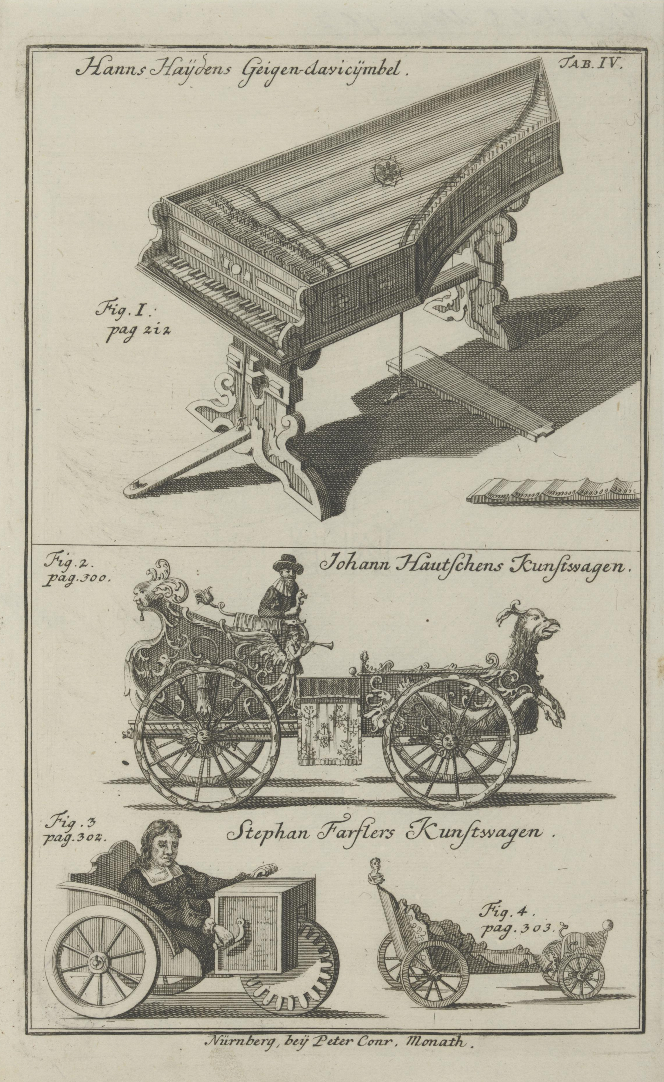 Darstellung von Hanns Haydens Geigen-clavicymbel, Johann Hautschens Kunstwagen und Stephan Farflers Kunstwagen, aus: Historische Nachricht von den nürnbergischen Mathematicis und Künstlern 1730[1][2] Radierung, 320 x 197 cm (Blatt) Peter Conrad Monath, Verleger, Nürnberg 1730 Nürnberg, Germanisches Nationalmuseum, Graphische Sammlung (Paul Wolfgang Merkel'sche Familienstiftung), Inventar-Nr. MP 10110, Kapsel-Nr. 167 References citations ↑ Hautsch, Farfler, Darstellung von Hanns Haydens Geigen-clavicymbel, Johann Hautschens Kunstwagen und Stephan Farflers Kunstwagen ↑ Doppelmayr, 1730, p. 341 bibliography Hautsch, Hans; Farfler, Stephan (1700-1747) Darstellung von Hanns Haydens Geigen-clavicymbel, Johann Hautschens Kunstwagen und Stephan Farflers Kunstwagen, Nuremberg: Peter Conrad Monath . (Germanisches Nationalmuseum Nürnberg; Bilddatei: gmmp10110-0167; Aufn.-Datum: 2010), (Nürnberg, Germanisches Nationalmuseum, Graphische Sammlung (Paul Wolfgang Merkel'sche Familienstiftung), Inventar-Nr. MP 10110, Kapsel-Nr. 167) Johann Gabriel Doppelmayr (1730) Historische Nachricht von den nürnbergischen Mathematicis und Künstlern, Nuremberg: Peter Conrad Monath, p. 341 . (Original from: the University of Michigan; Digitized: 6 Mar 2012; Length: 314 pages)